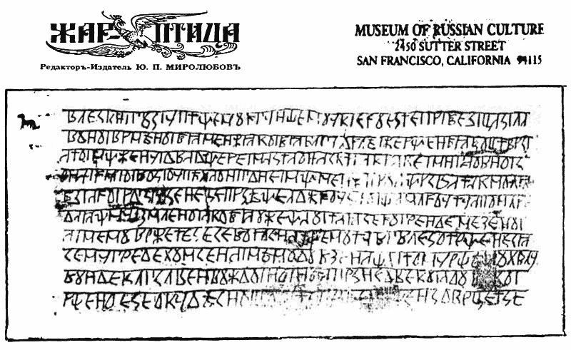 Фотокопія дощечки 16а з реконструкцією. Світова копія. Знято в 1928 р. з "дощечки". Оригінал без ретуши з журналу "Жар-птица" 1955р.